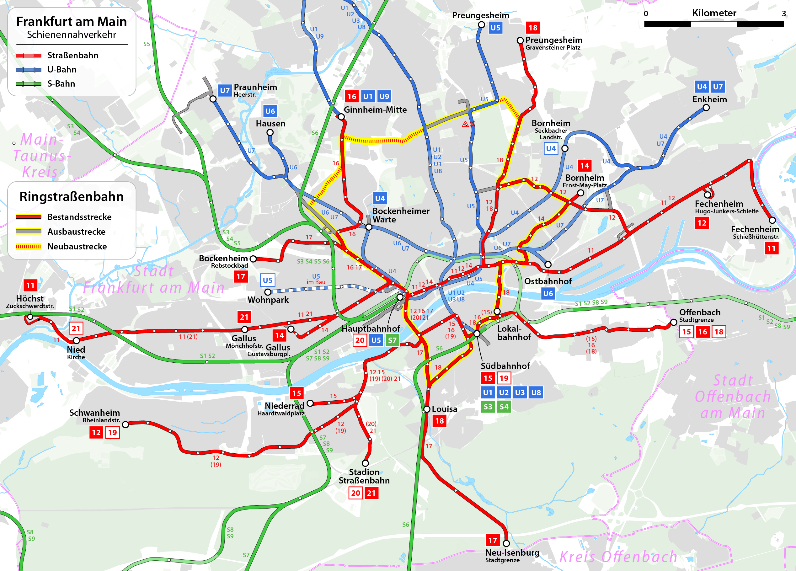 Streckenführung der geplanten Ringstraßenbahn der Straßenbahn Frankfurt am Main